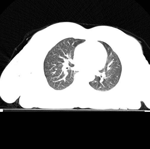 CT PULMON